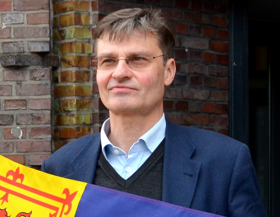 Anlässlich der Lesung „Ein König aus Hannover“, der Romanbiographie von Heinrich Thies über König Georg I. von Großbritannien und Irland, präsentieren der Fotograf Eckard Schrader und Prinz Heinrich vor dem Anzeiger-Hochhaus eine nachgemachte Flagge des Monarchen, mit dem die 123 Jahre währende Personalunion zwischen Großbritannien und Hannover begann ...